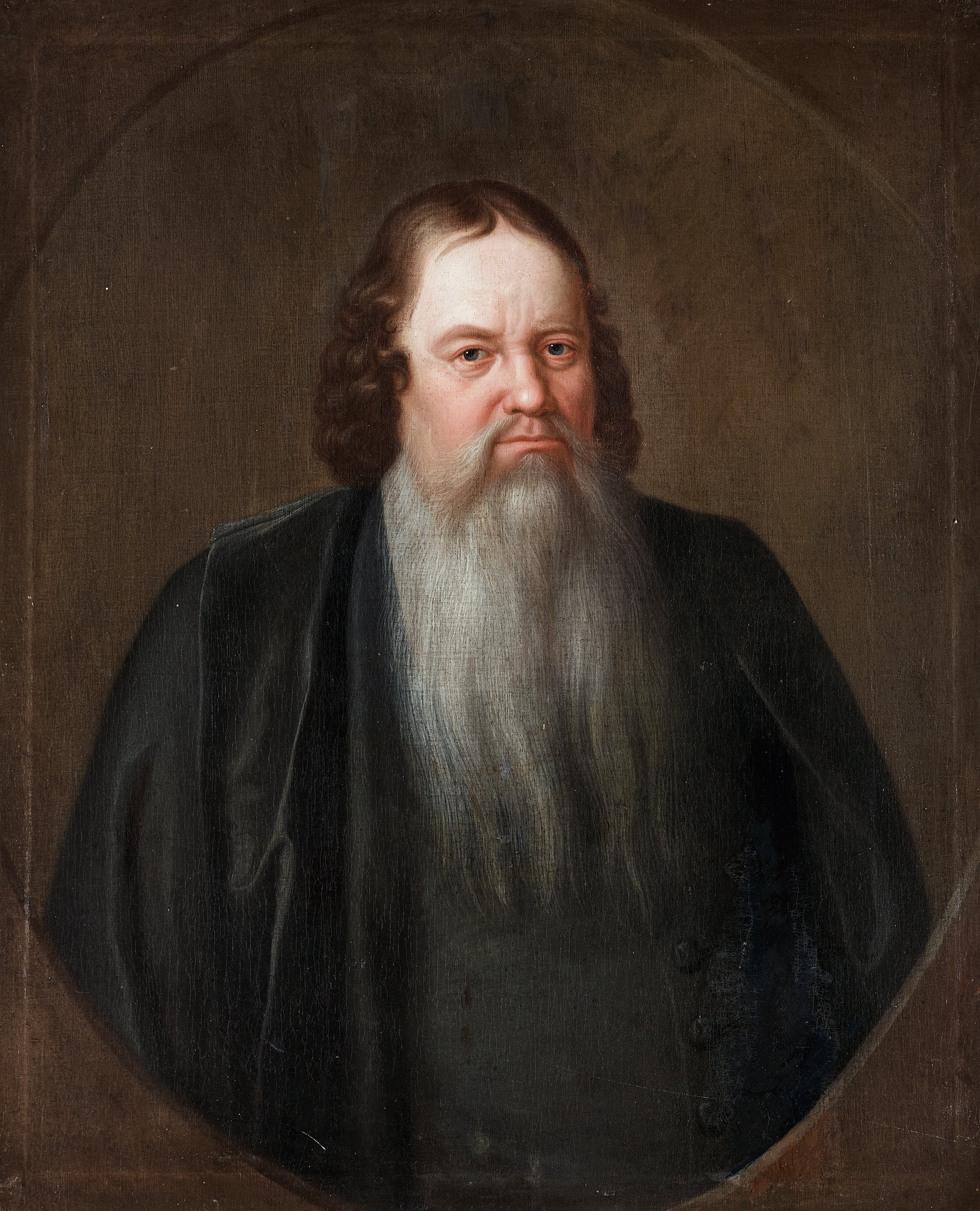 Biskop Carolus Carlsson (Cederström) 1642-1708, avportyrätterad av David Klöcker Ehrenstrahl. Har tillhört Familjen Cederström, Beatelunds och Rikstens fideikommiss, Södermanland.